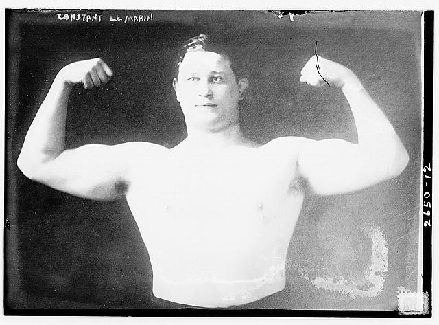 Plaque photographique de Constant le Marin, vers 1910-1915, Bibliothèque du Congrès. Reproduction Number: LC-DIG-ggbain-12649 (digital file from original negative)